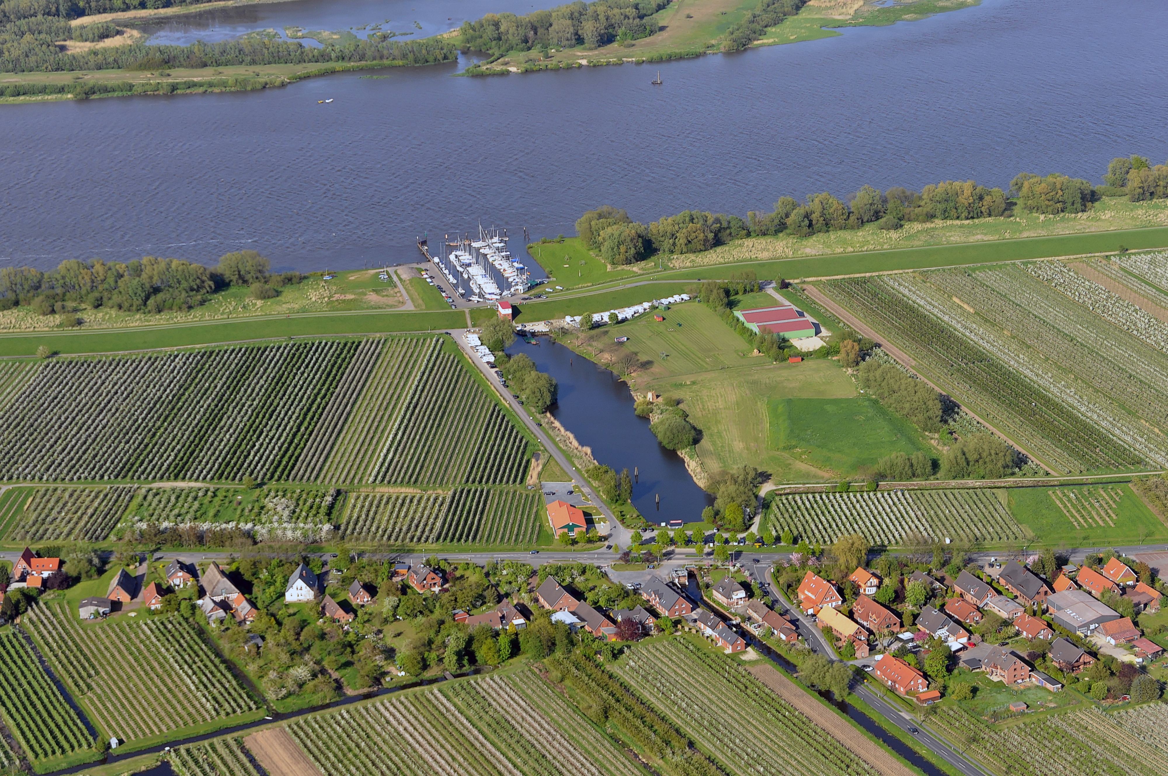 Luftbilder von der Nordseeküste 2012-05